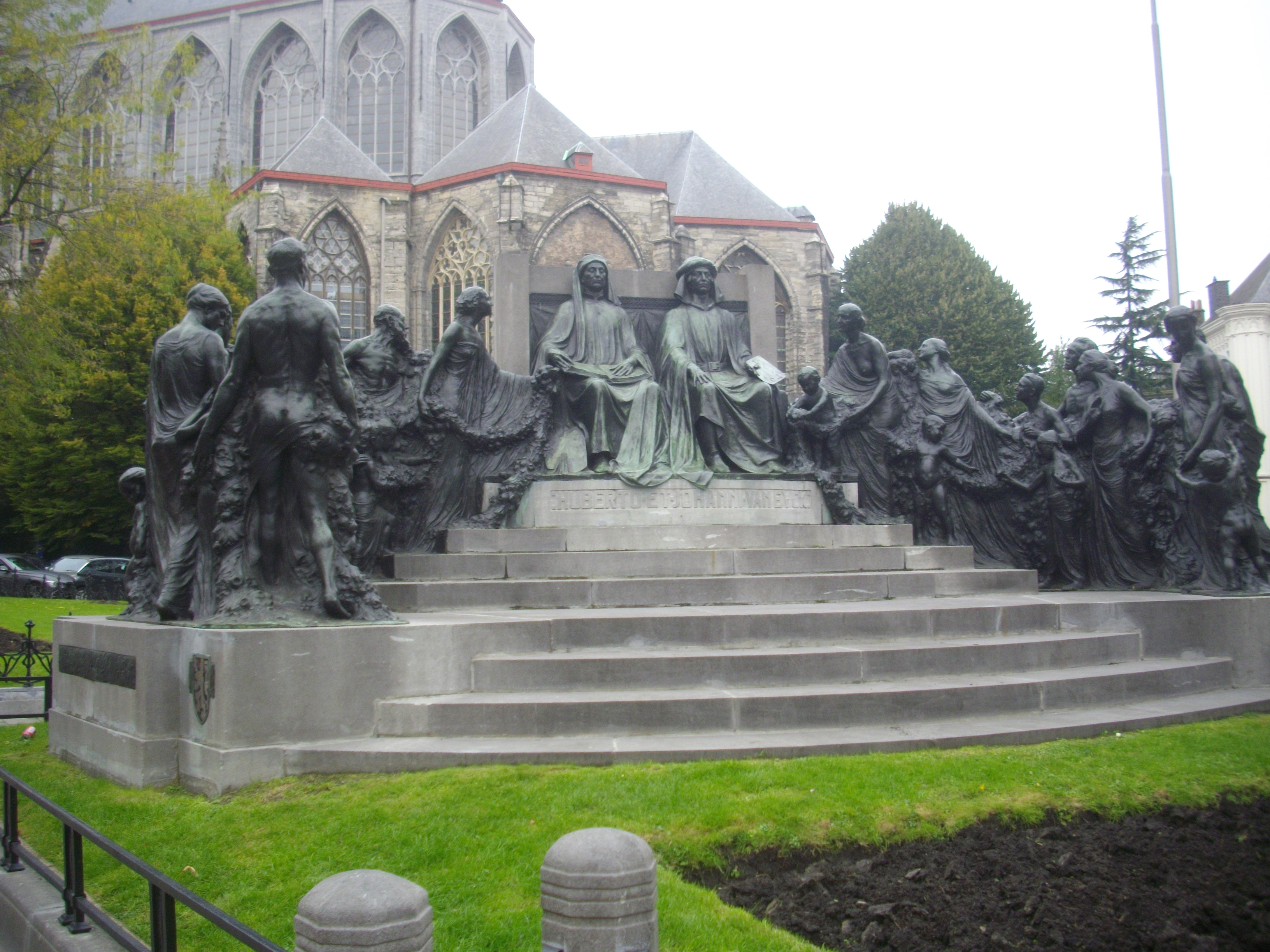 Μνημείο για τους αδελφούς φαν Άικ στην πόλη της Γάνδης